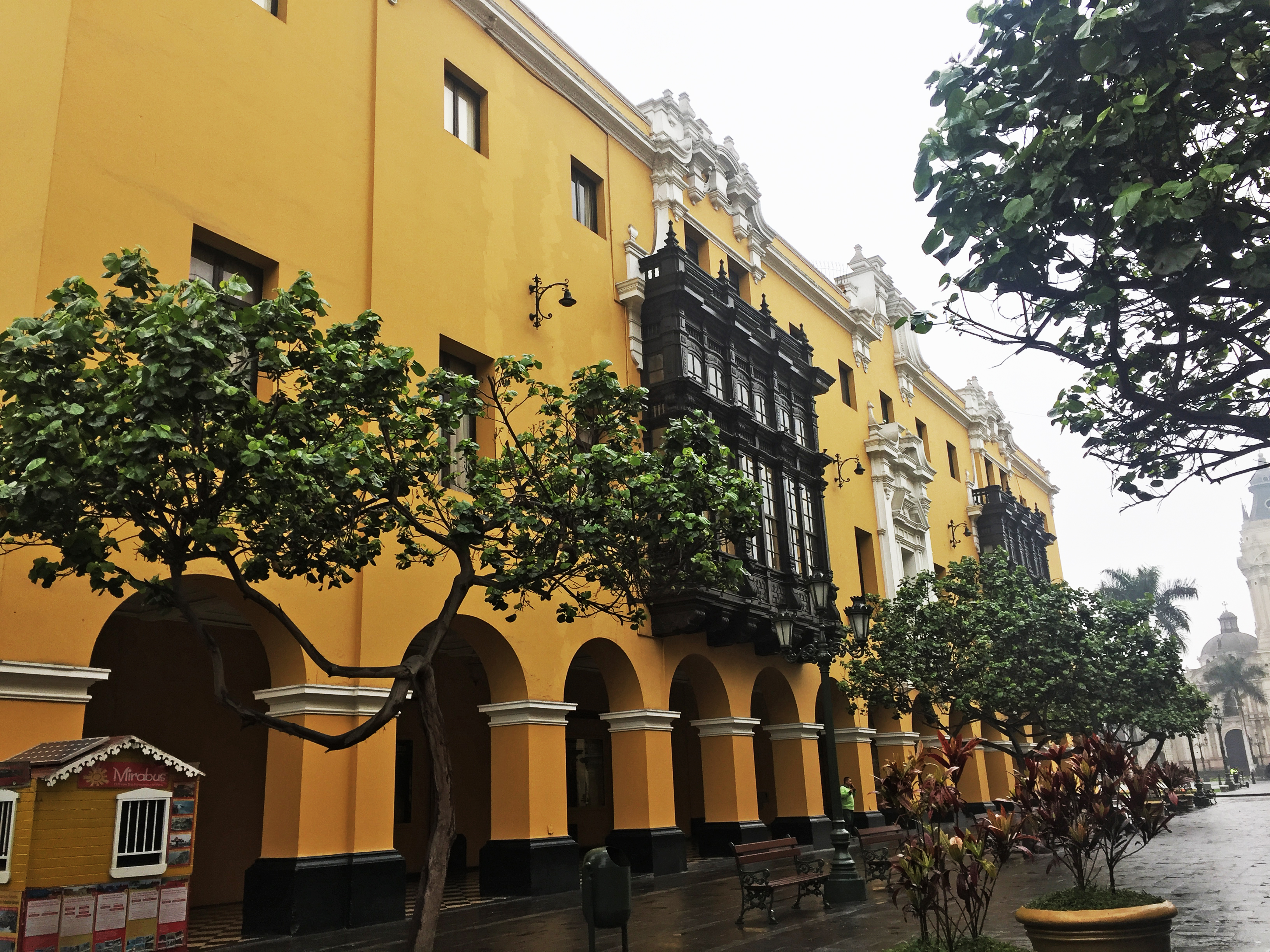 Municipalidad de Lima